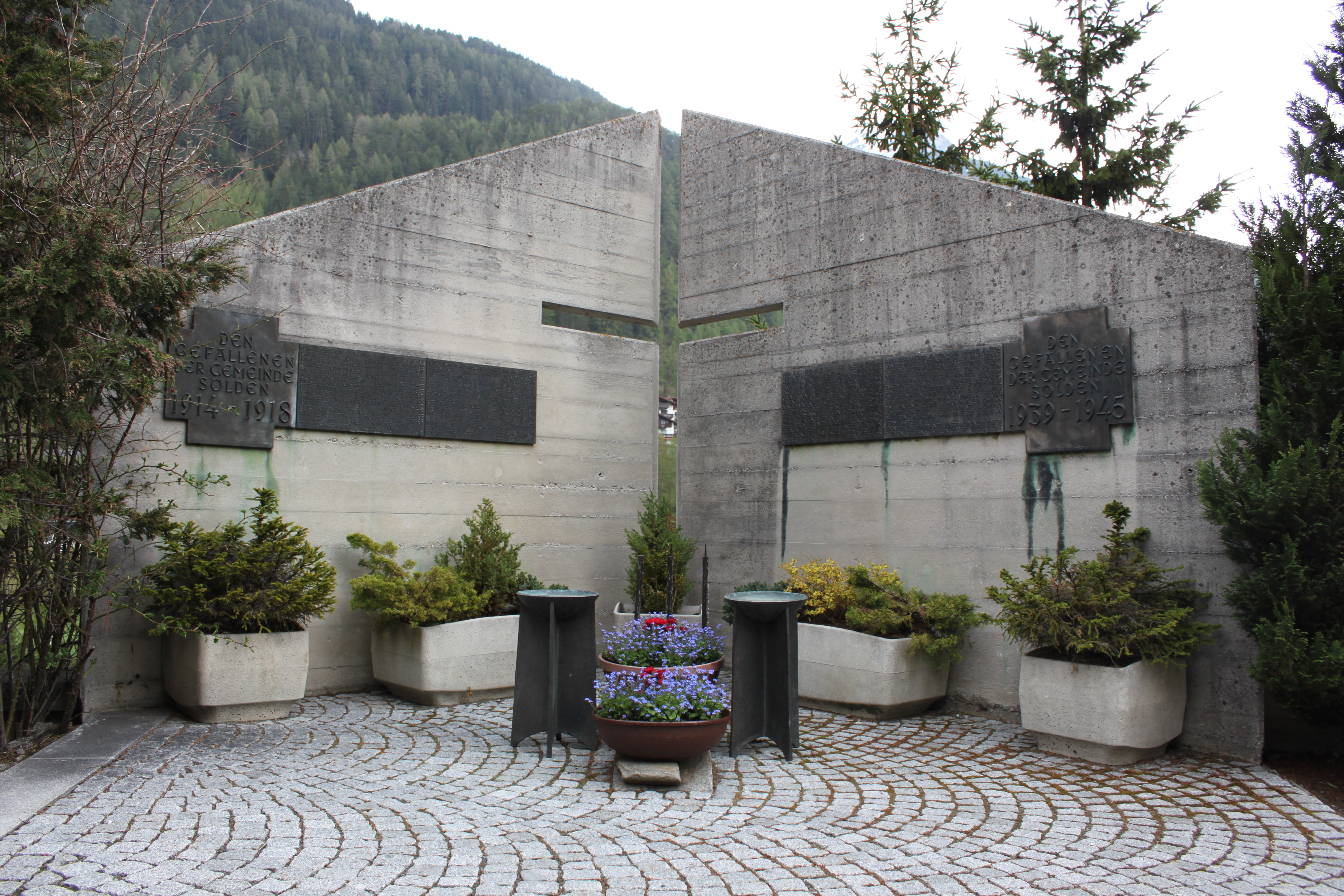 Kriegerdenkmal im Friedhof in Sölden, Architekt Hans Loch, 1969 This media shows the remarkable cultural object in the Austrian state of Tyrol listed by the Tyrolean Art Cadastre with the ID 37913.